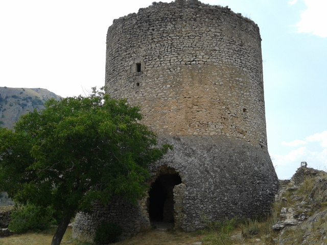 Torre di Ortona dei Marsi